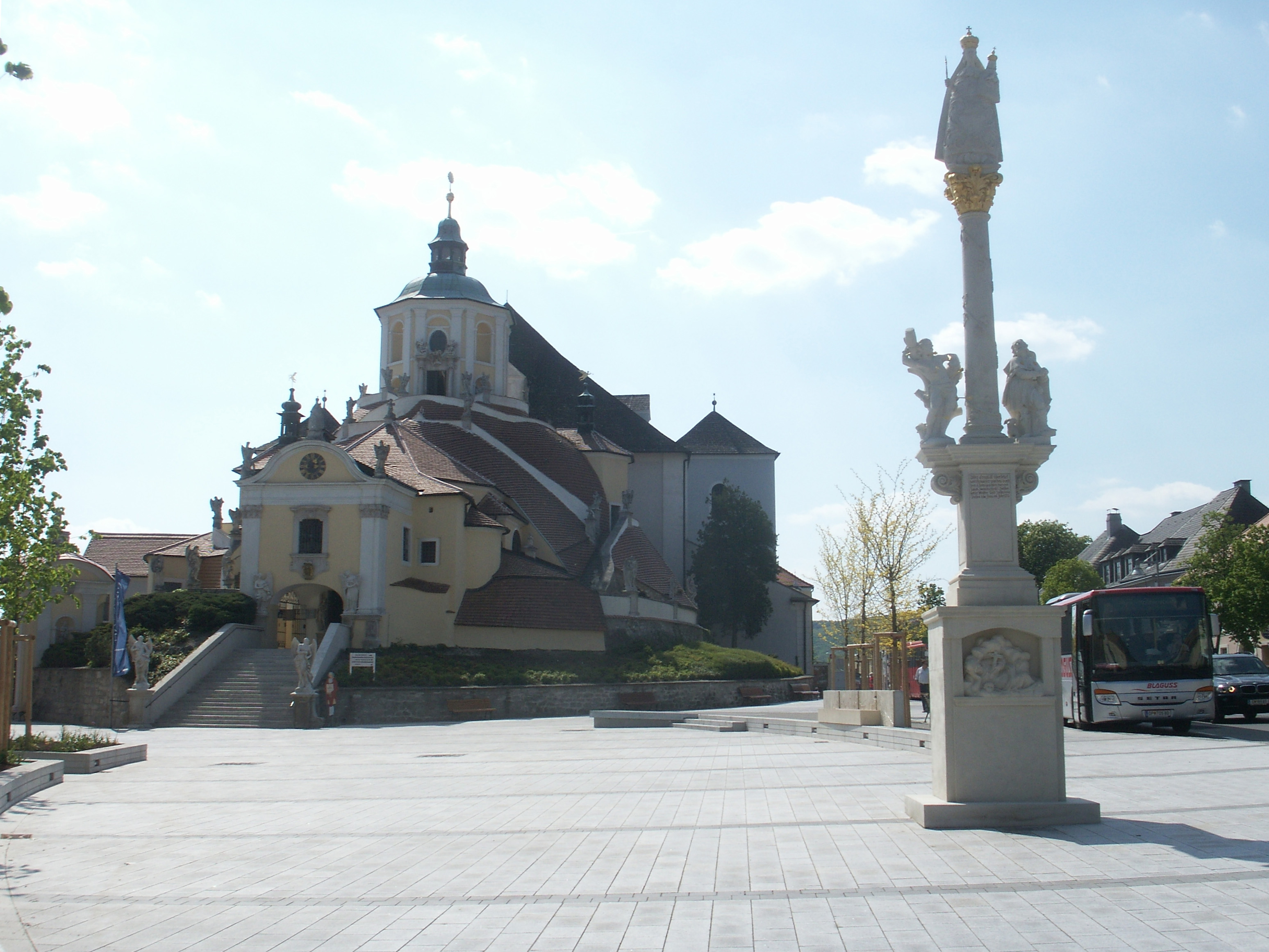 Bergkirche (Haydnkirche), Eisenstadt, Burgenland